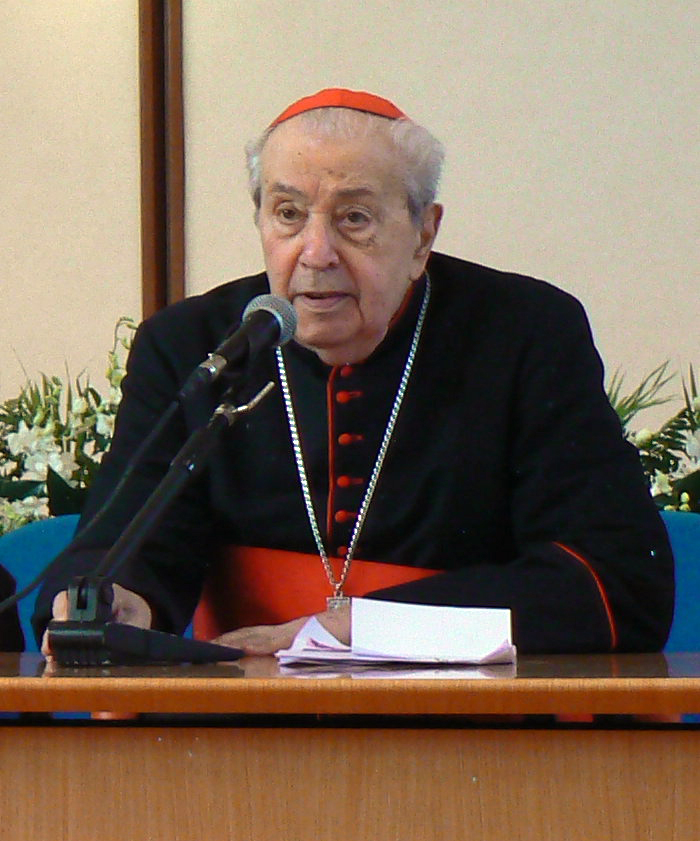 cardinale Achille Silvestrini